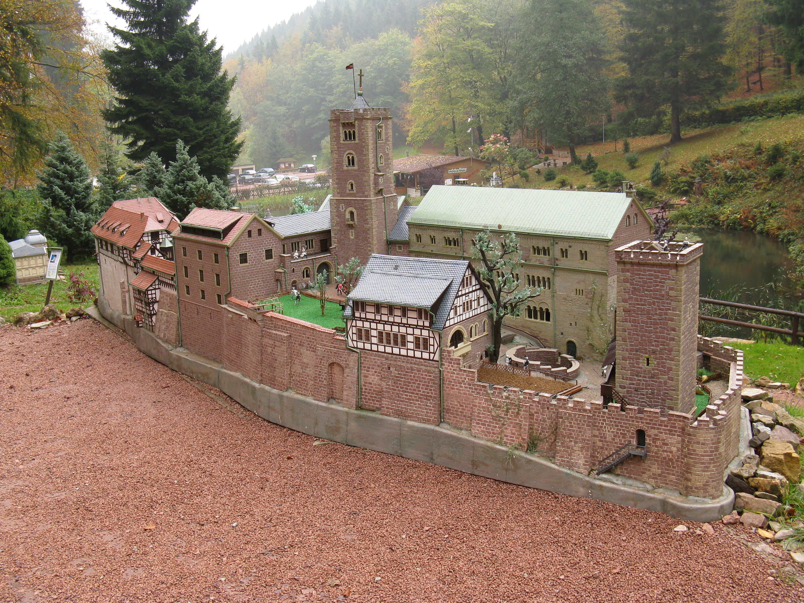 Mini-a-Thür in Ruhla: Wartburg